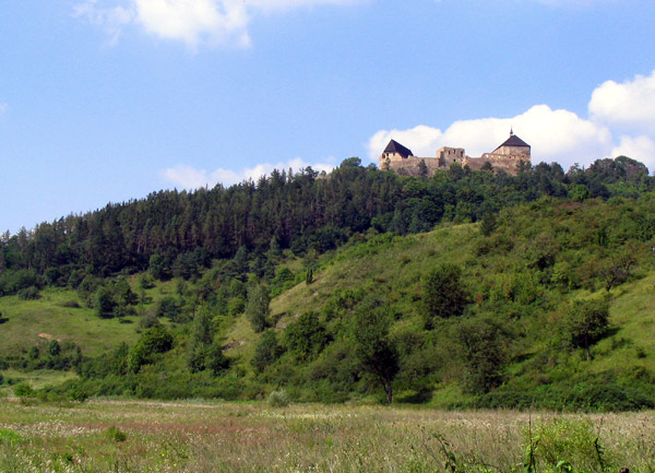 Hrad Točník od jihu.